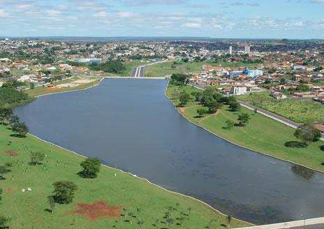 Represa do Halley, em Catalão, Goiás